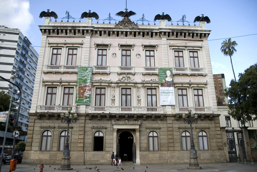 Endereço: Rua do Catete, 153 – Rio de Janeiro – RJ. Tel: (21) 3235-3693 Horários: Terça a sexta, das 10h às 17h, aos sábados, domingos e feriados, das 14h às 18h Foto: Divulgação IBRAM migre.me/cJCxT